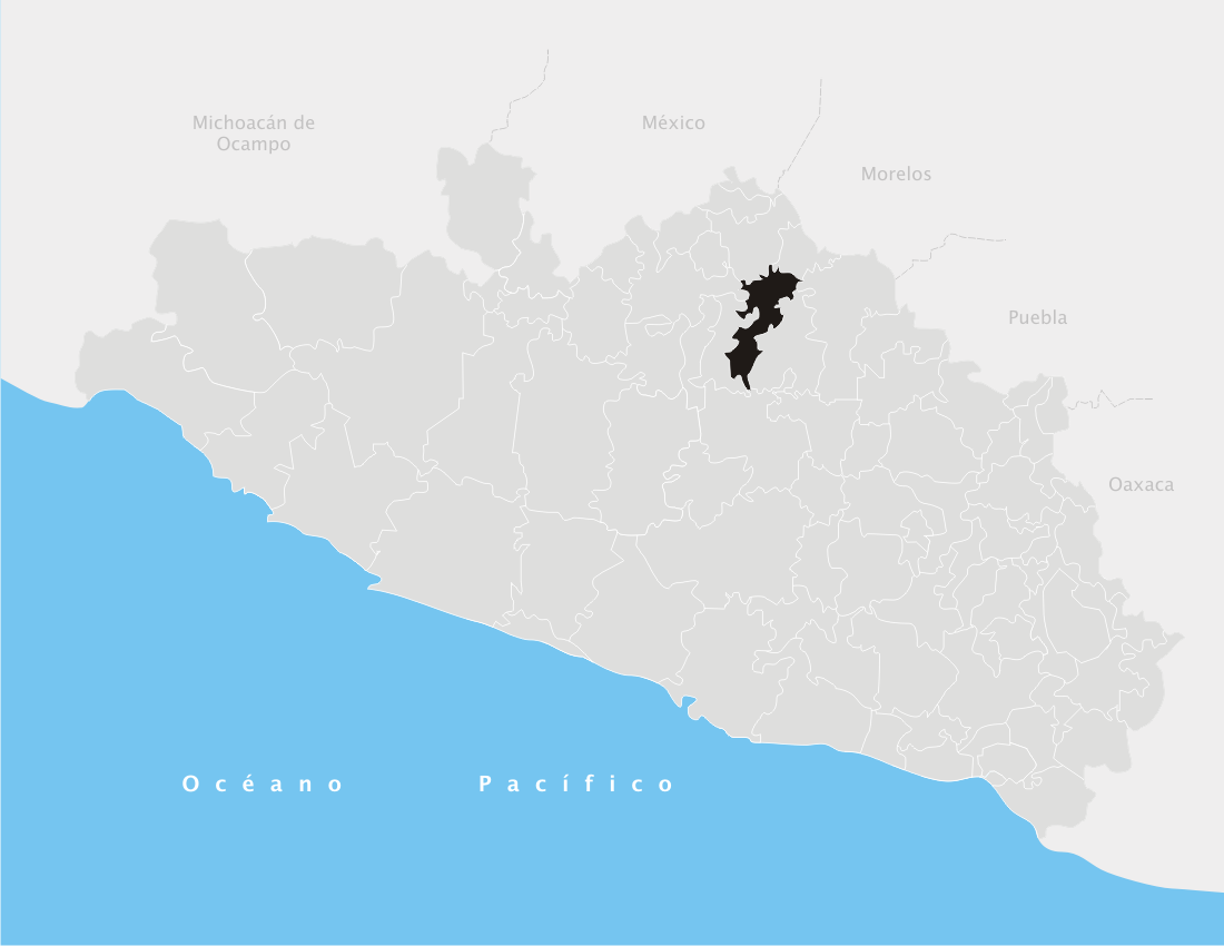 Iguala de la Independencia en el estado de Guerrero (México)